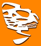 Logotipo del Centenario de Carlos Raul Villanueva - ganador de un concurso realizado a tal fin; el LTAD puso mucho de su parte en el desarrollo de contenidos y modelos para el portal conmemorativo, abandonado con el cambio de autoridades (cuando no!) solo queda cerca de un 20 % del proyecto en servidores de la CANTV